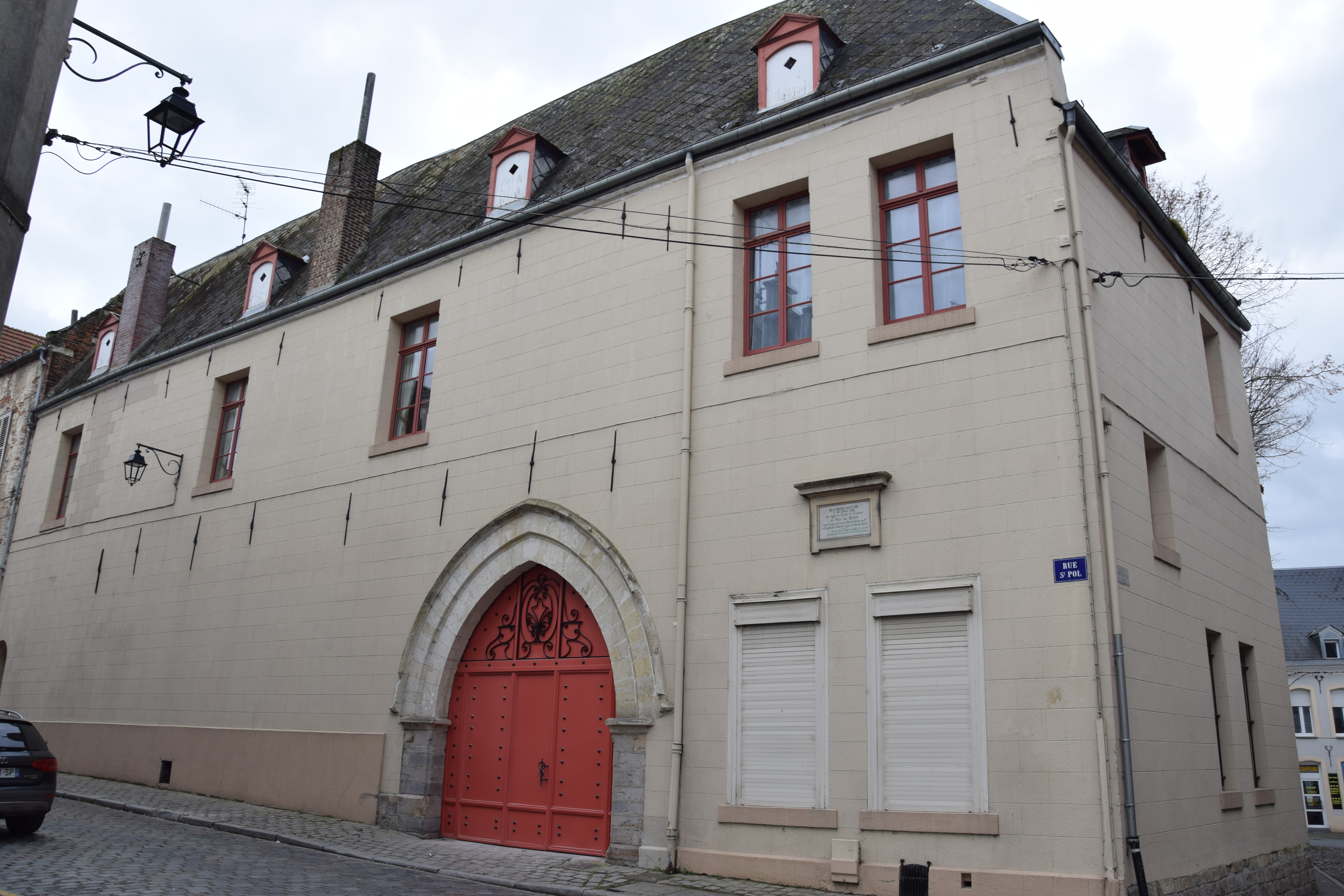 Hôtel Saint Pol de Cambrai